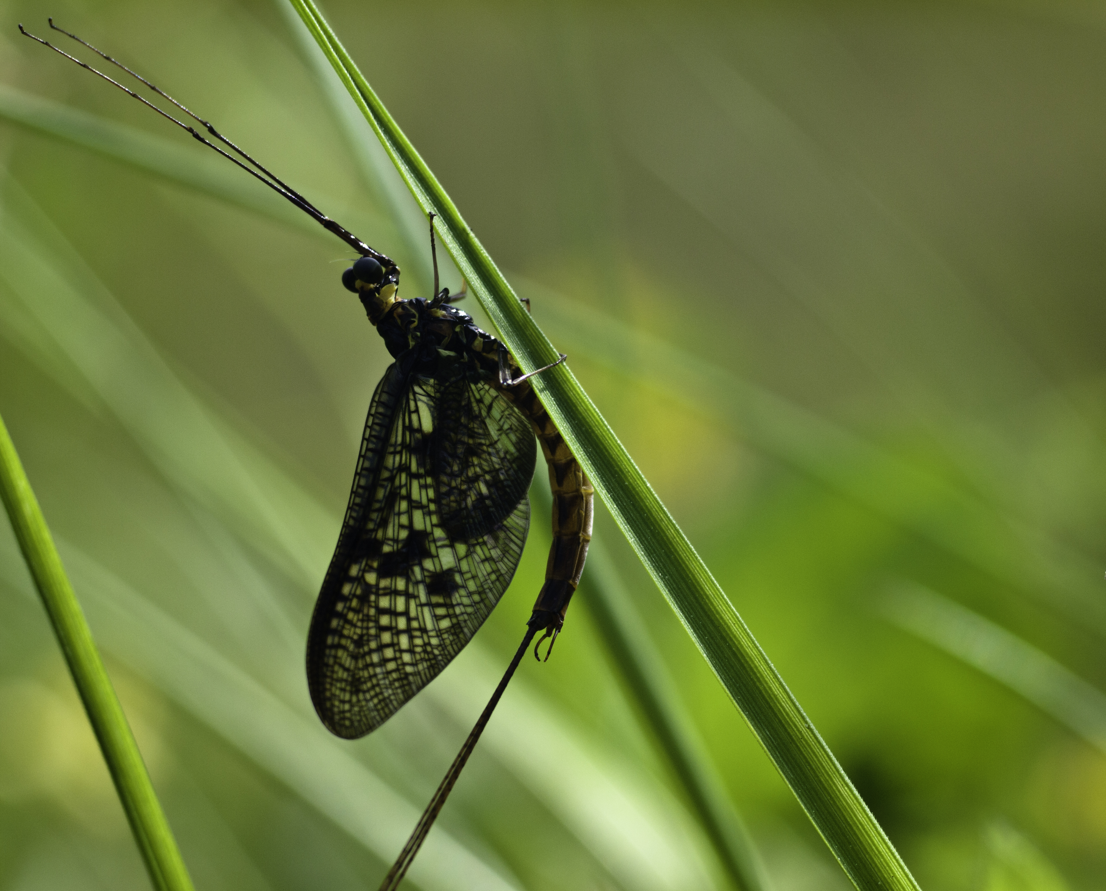 Große Eintagsfliege